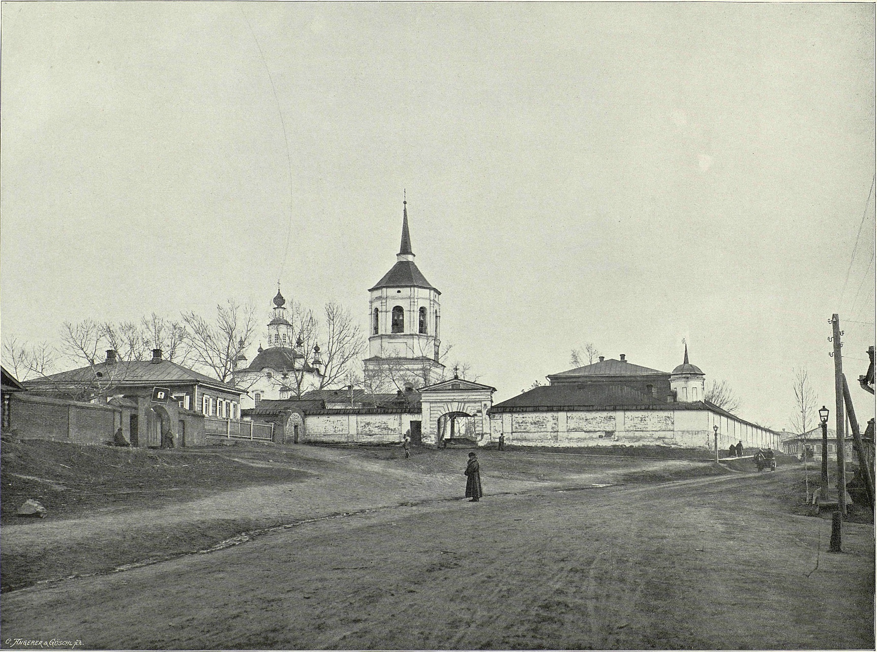 Томск. Алексеевский мужской монастырь